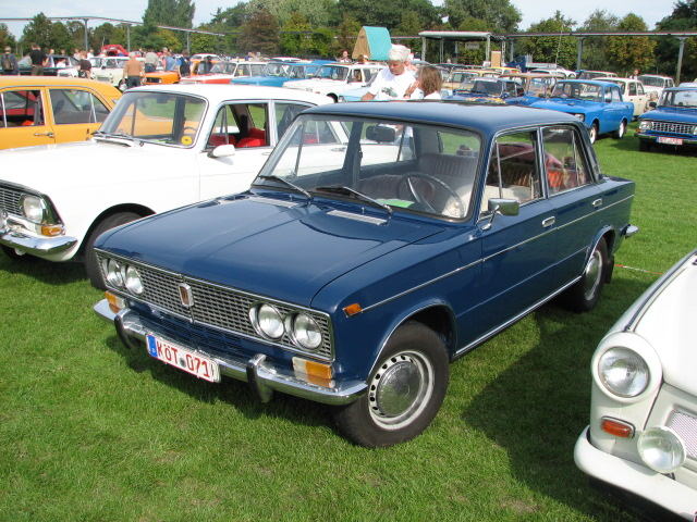 Lada